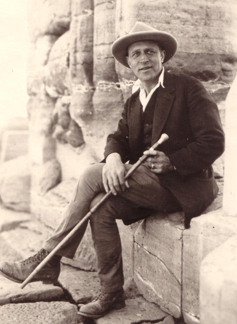 Photographie de l'égyptologue français Fernand Bisson de La Roque